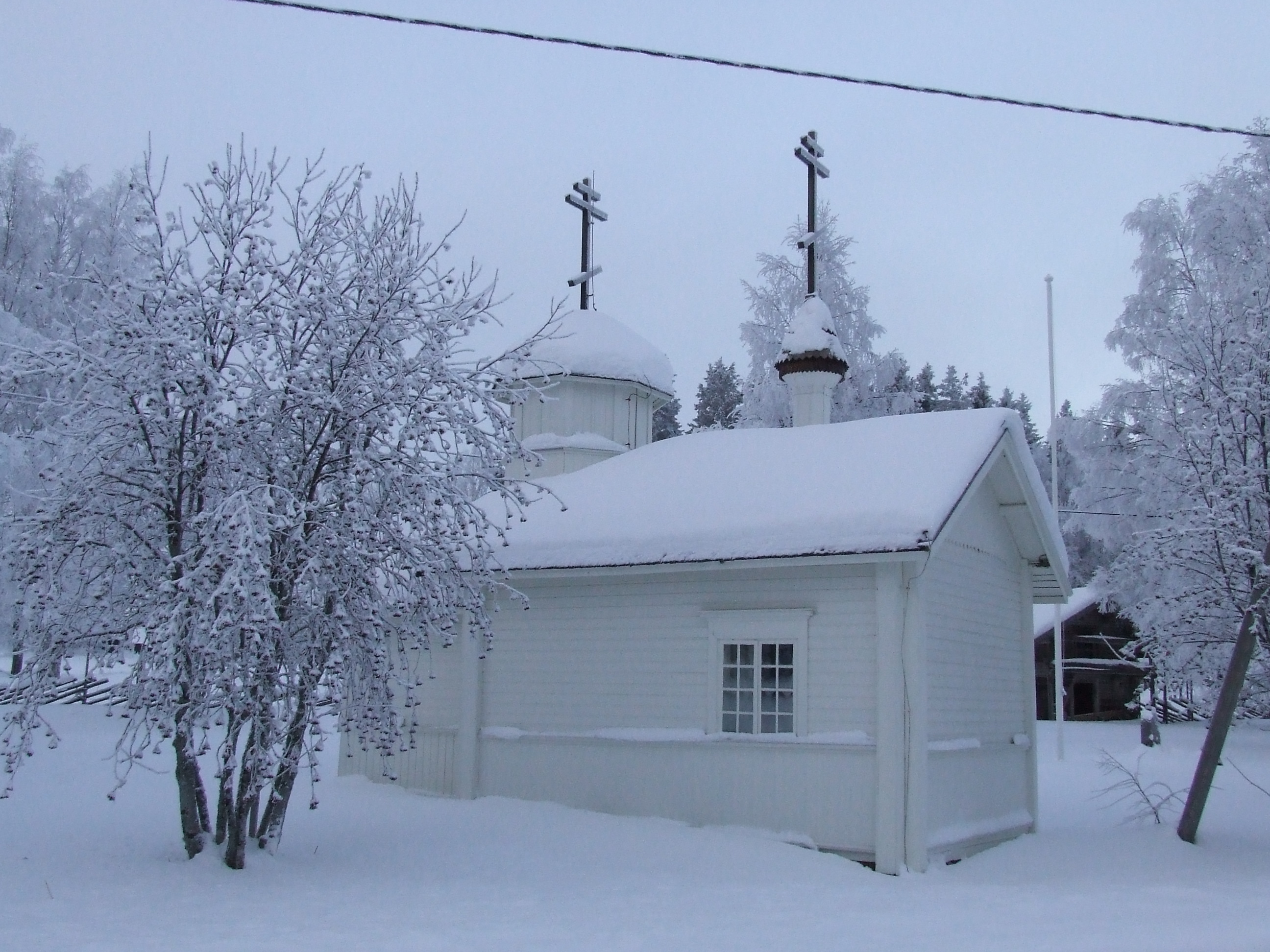 Hattuvaaran tsasouna Ilomantsissa